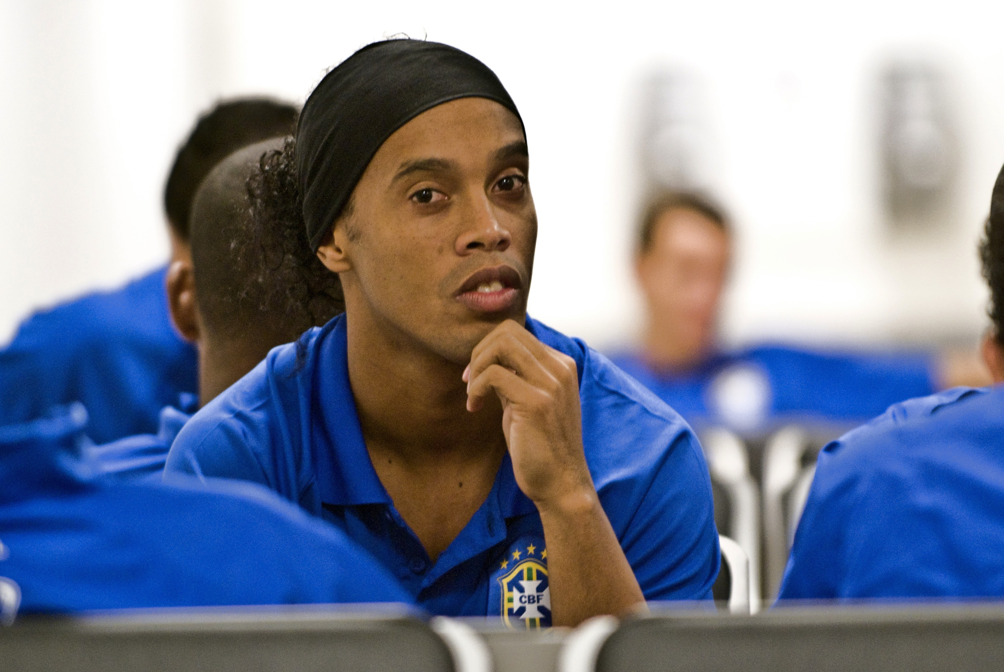 RonaldinhoRonaldinho